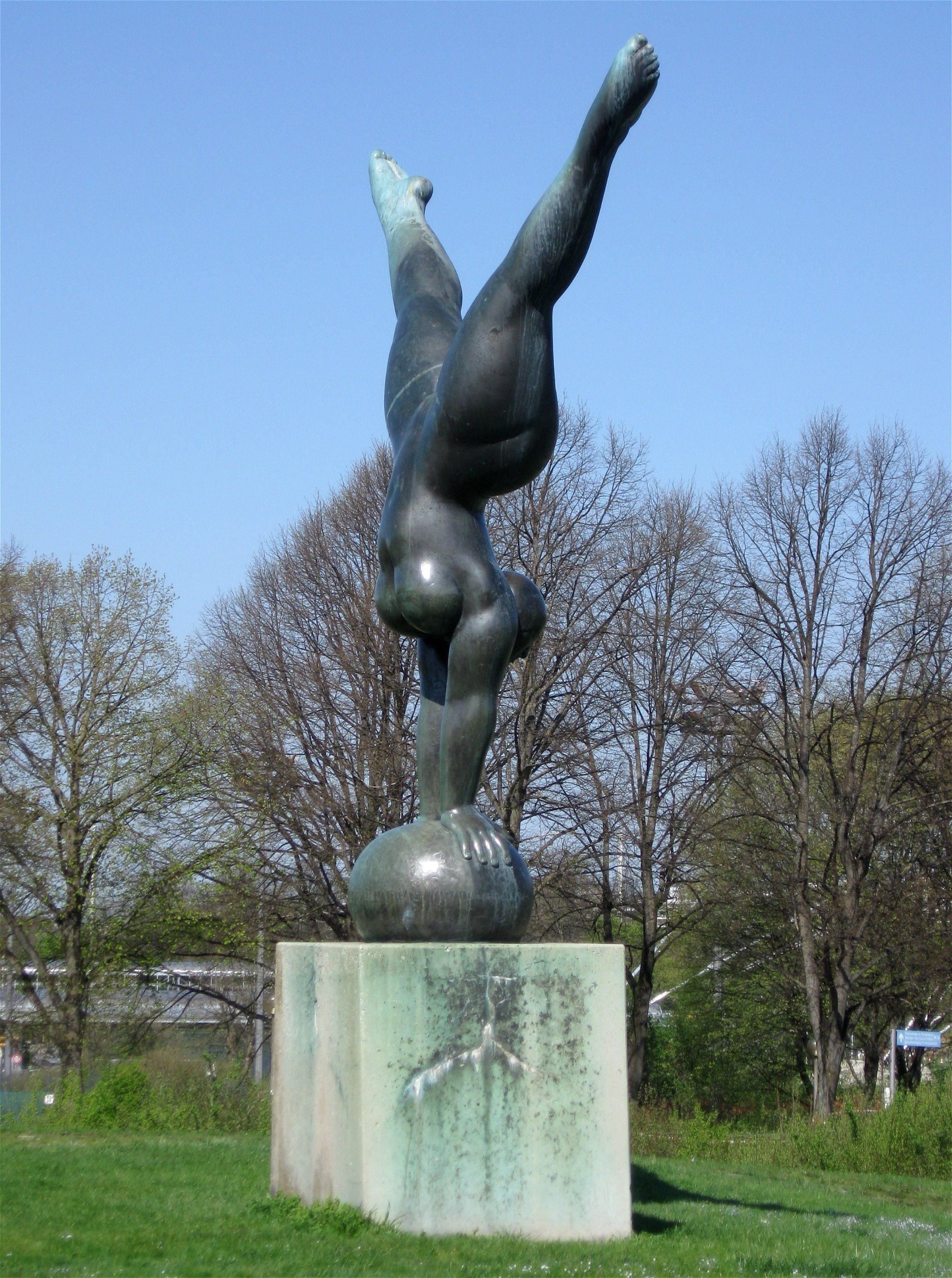 Martin Mayer: Olympia Triumphans (1973), Bronze, Höhe 385 cm, Olympiapark, München